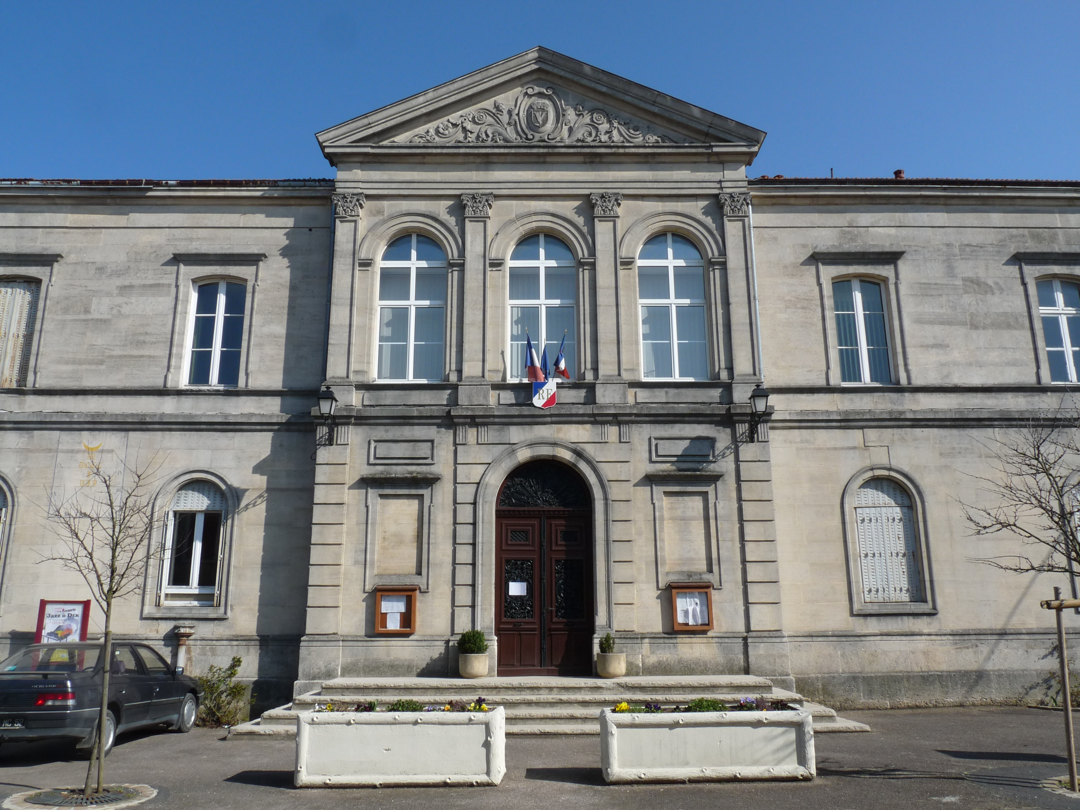 Hôtel de ville de Vaux-sur-Blaise (Haute-Marne)